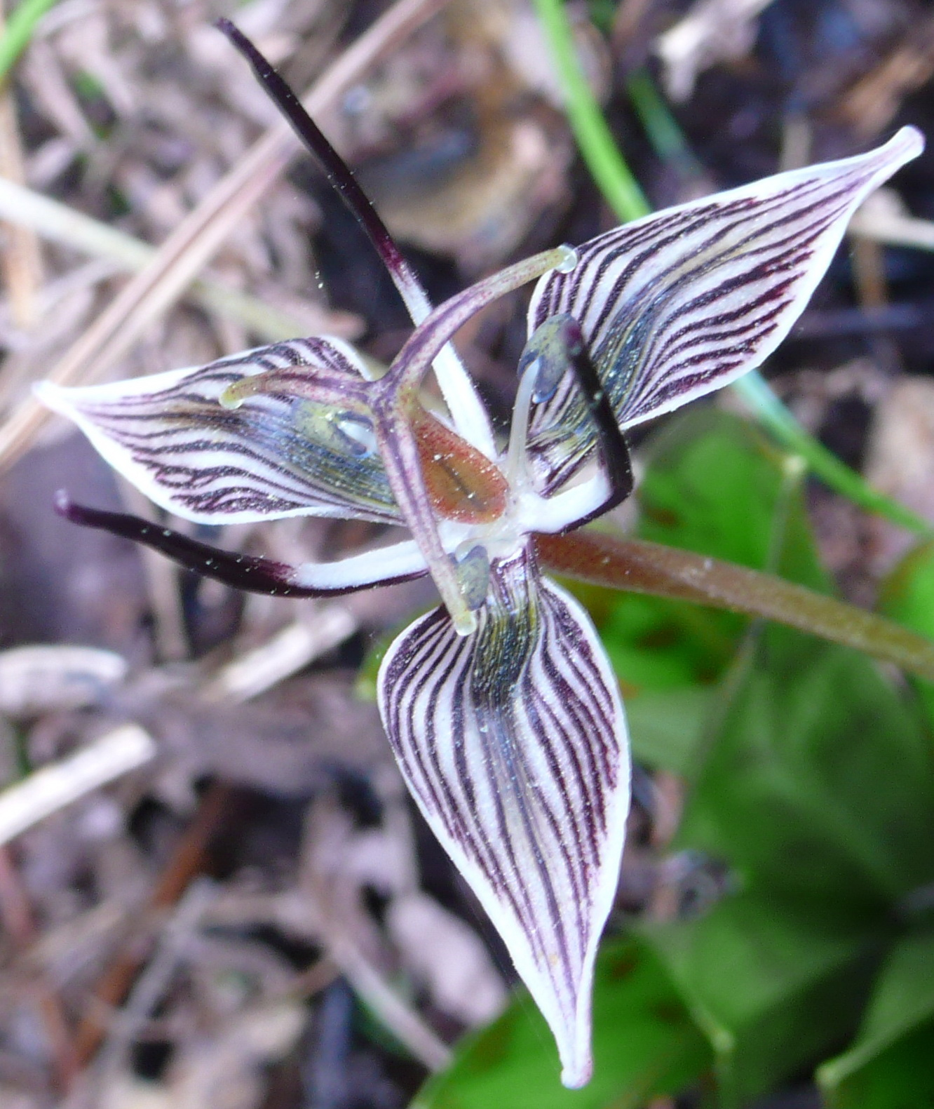 Scoliopus biglovii